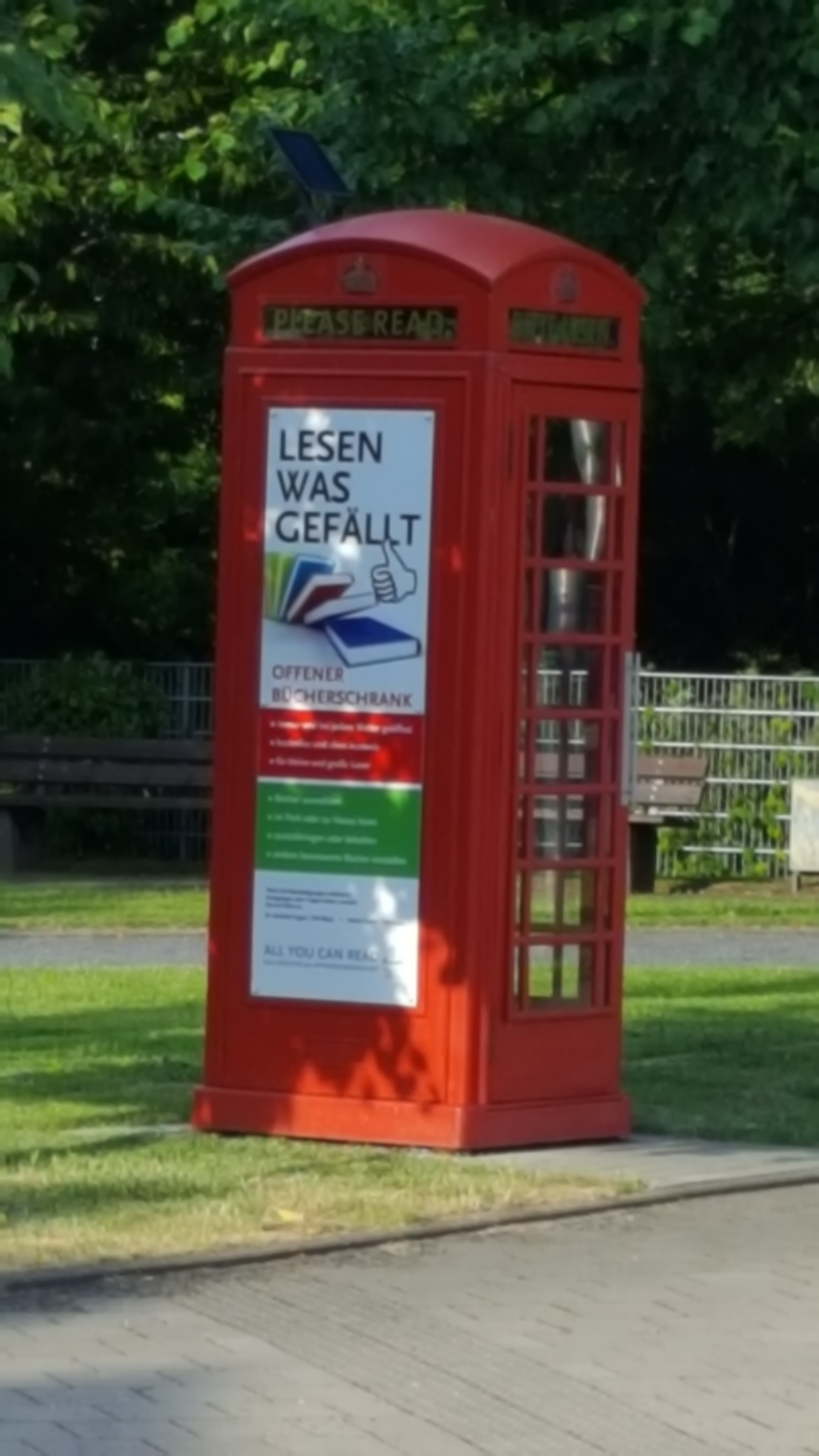 Ein öffentlicher Bücherschrank in Düren-Hoven am Arnold-Decker-Platz.